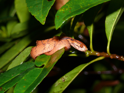 西表島にて撮影。